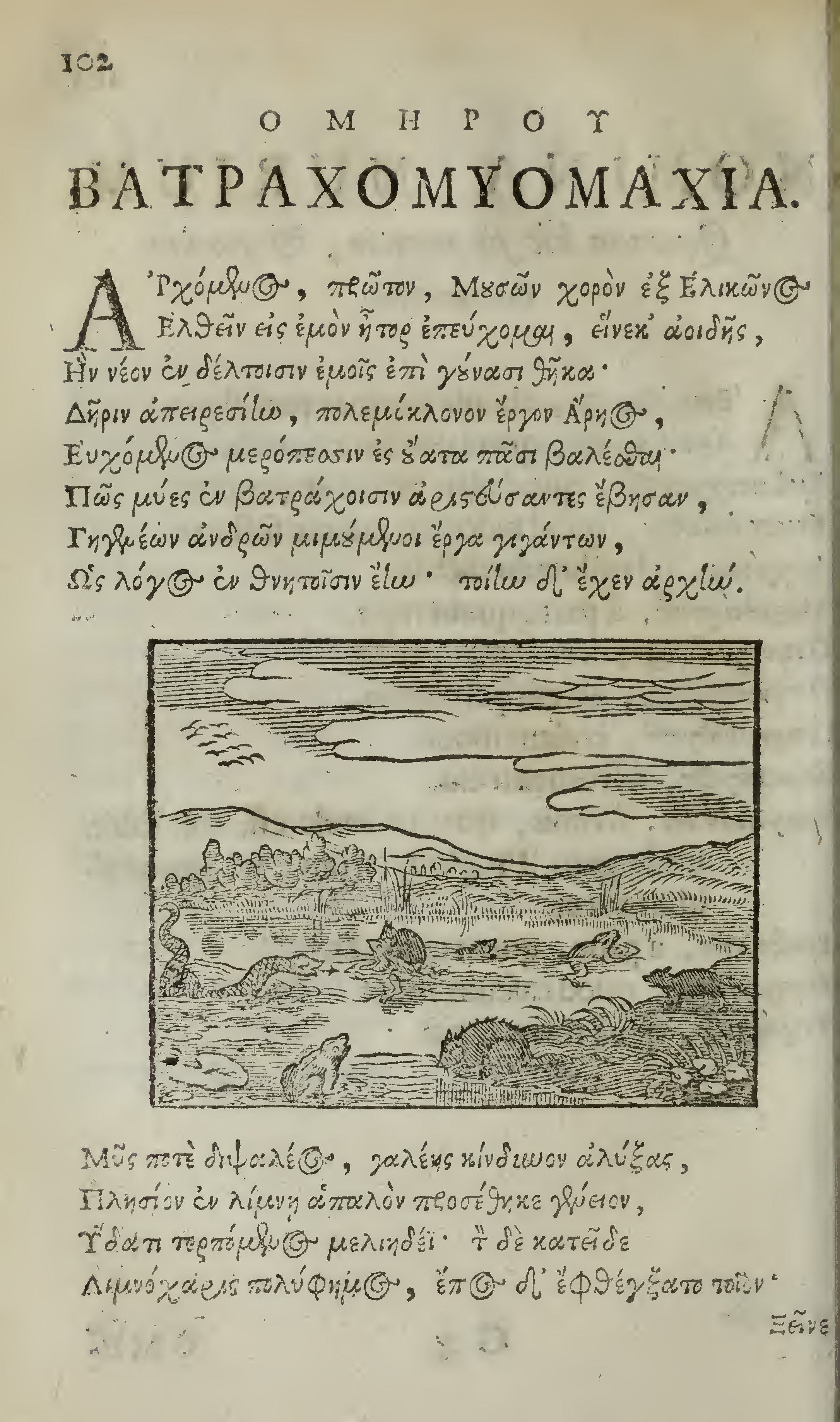 Pagina prima Batrachomyomachiae ex editione anni 1726